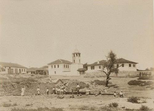 Снимка на църквата и училището в Кула